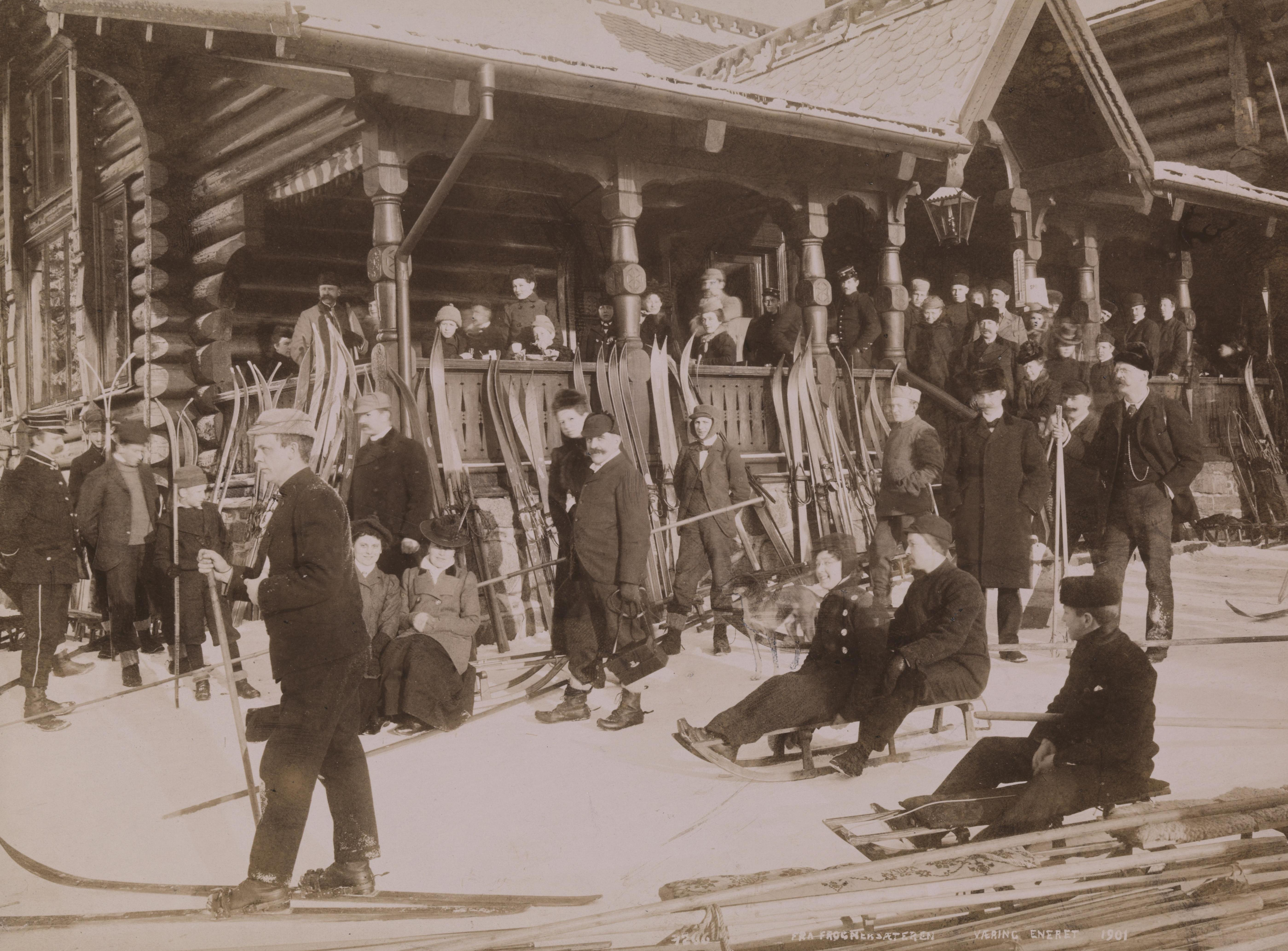 Bildet er hentet fra Nasjonalbibliotekets bildesamling Frognersætra, Oslo, Oslo